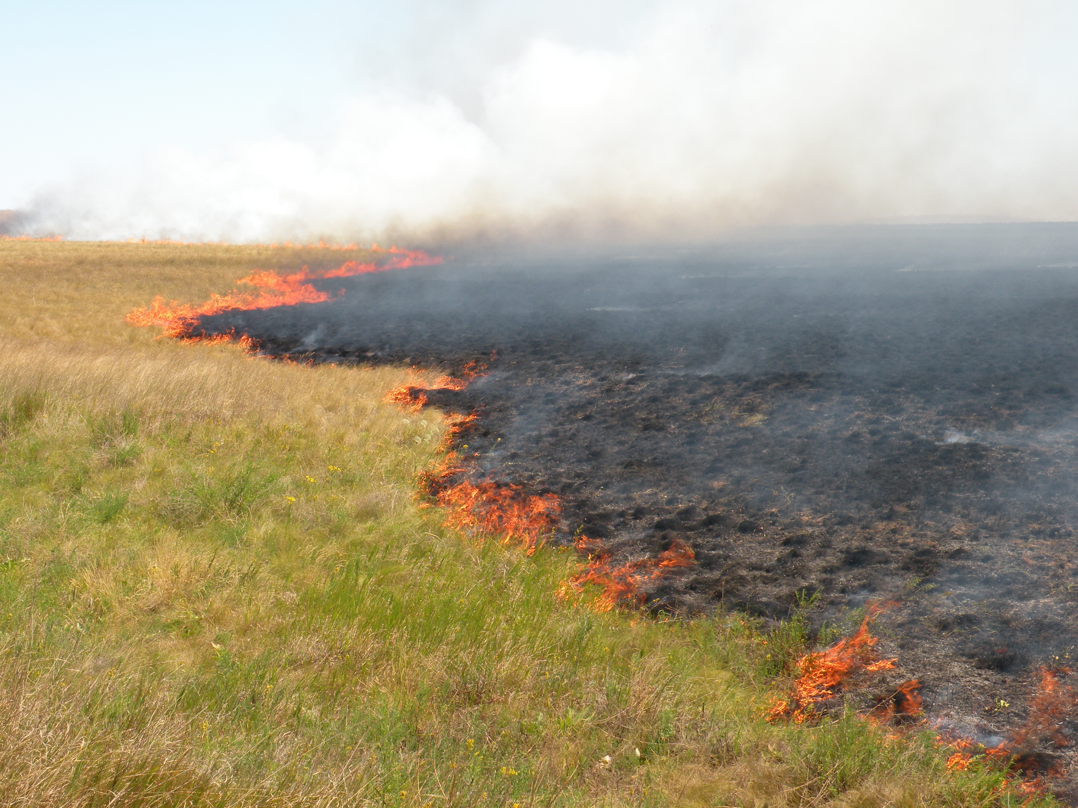 Степной пожар в настоящей разнотравно-дерновиннозлаково-ковыльной степи на террасе р. Ишим восточнее г.Державинск Костанайской области Казахстана